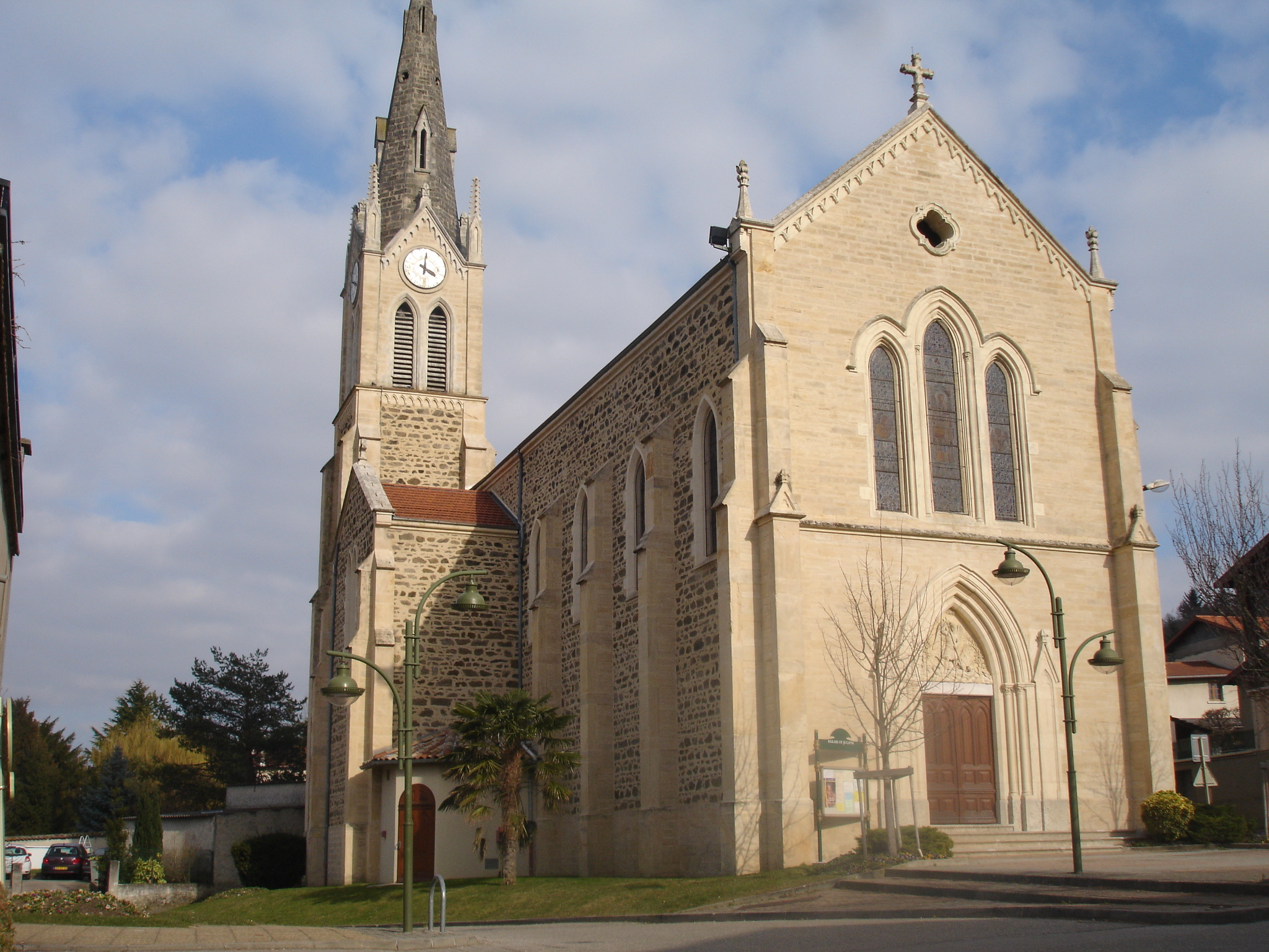 Marennes (69) : l'église